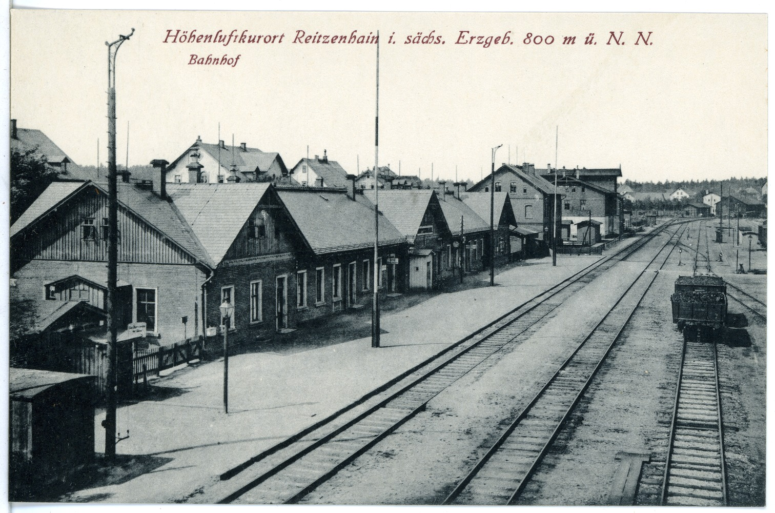 Reitzenhain; Bahnhof This postcard is from publisher Brück & Sohn in Meißen ( postcard has a unique number 21091 and is available in a higher resolution at the publisher. This images was uploaded in a cooperation project between Wikipedians and the publisher.